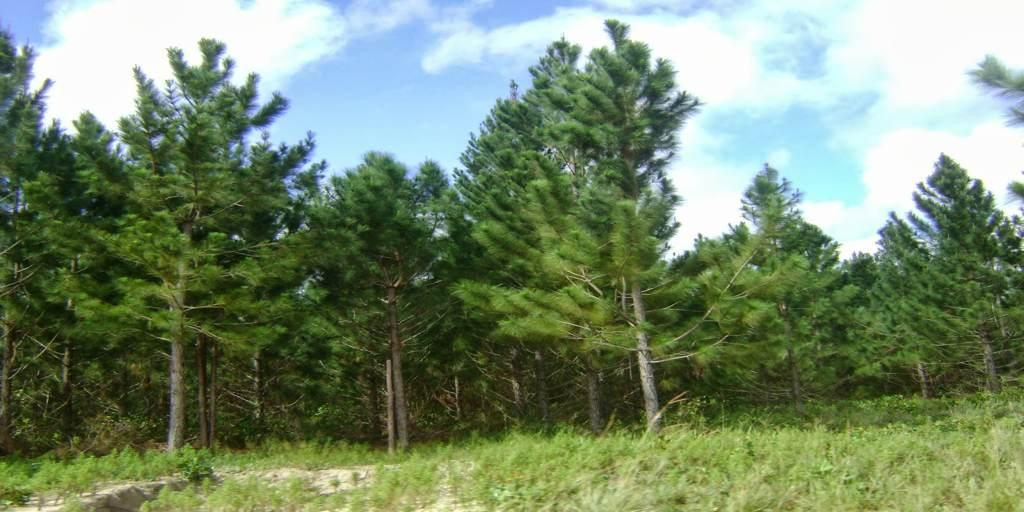 Plantación de Uverito